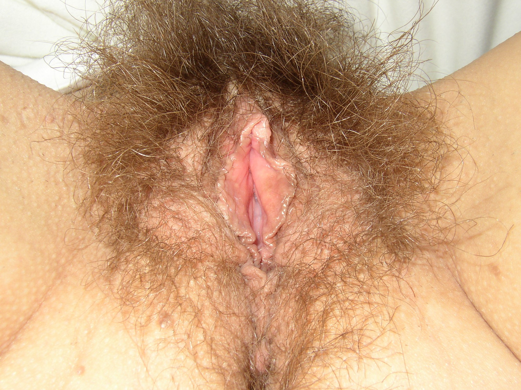 sarah69